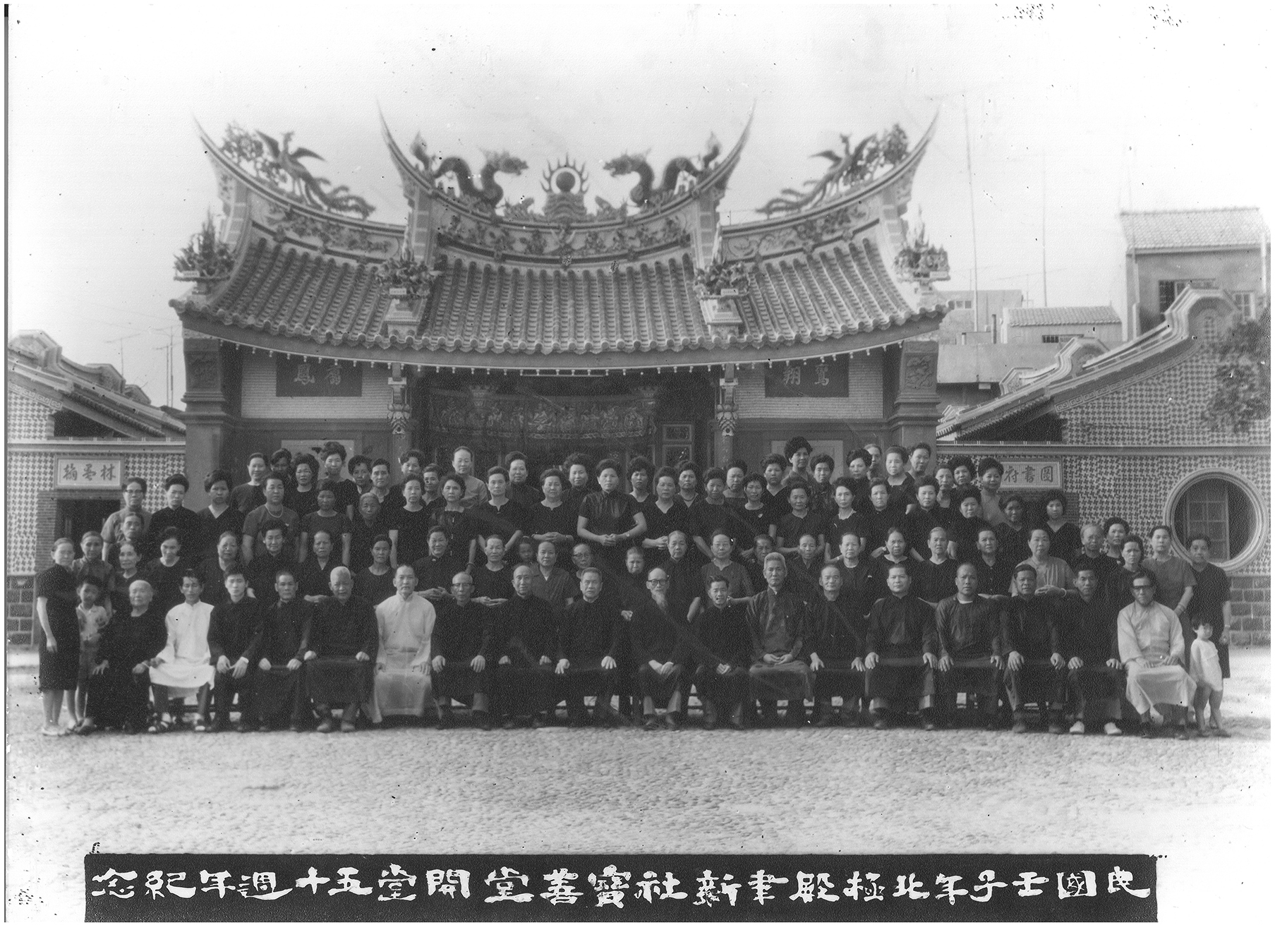 東甲北極殿-聿新社寶善堂-開堂50周年-攝於1972年